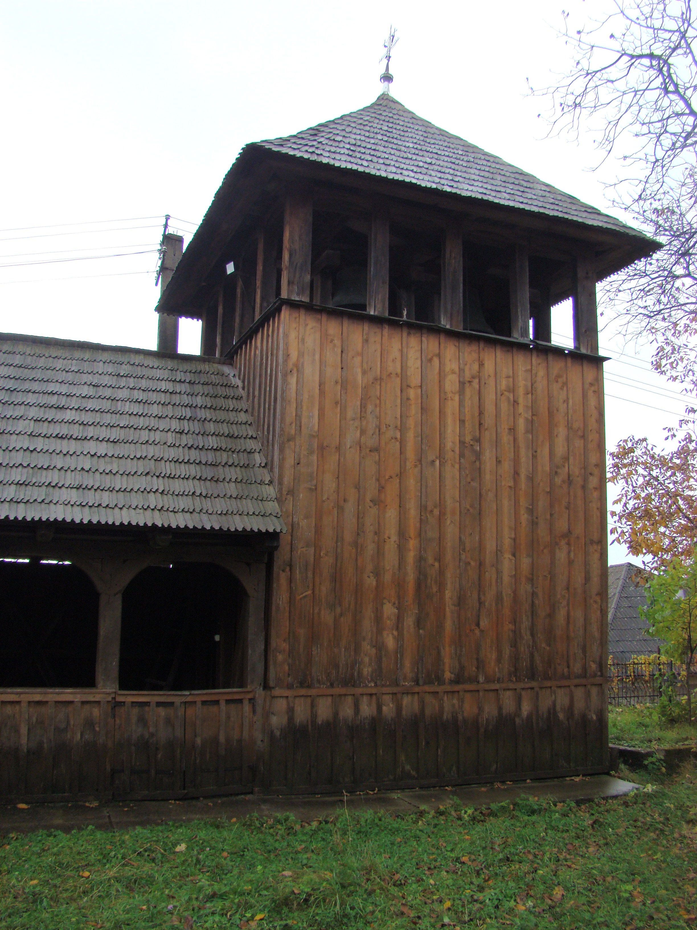 Clopotnița din lemn, sat Cetățele; comuna Șișești, județul Maramureș 03